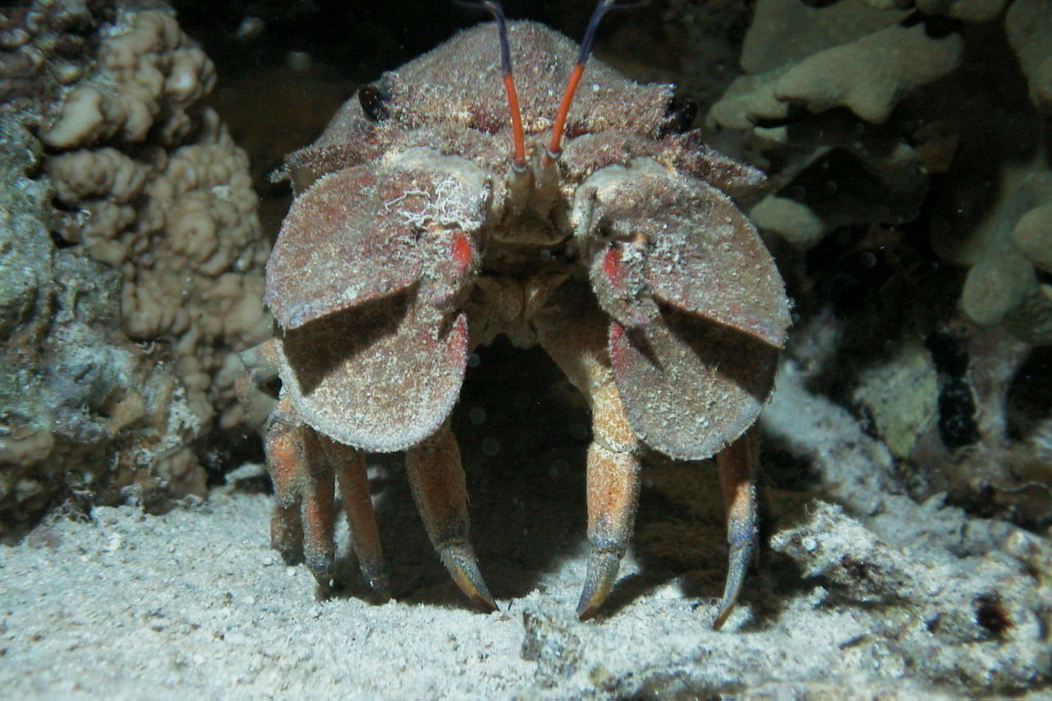 Großer Bärenkrebs (scyllarides latus) von vorne, fotografiert bei einem Nacht-Tauchgang bei Tobia Arba / Safaga / Rotes Meer / Ägypten. Das Fotos wurde von mir selbst erstellt und ist im Originalzustand (also nicht bearbeitet) Weitere Fotos unter